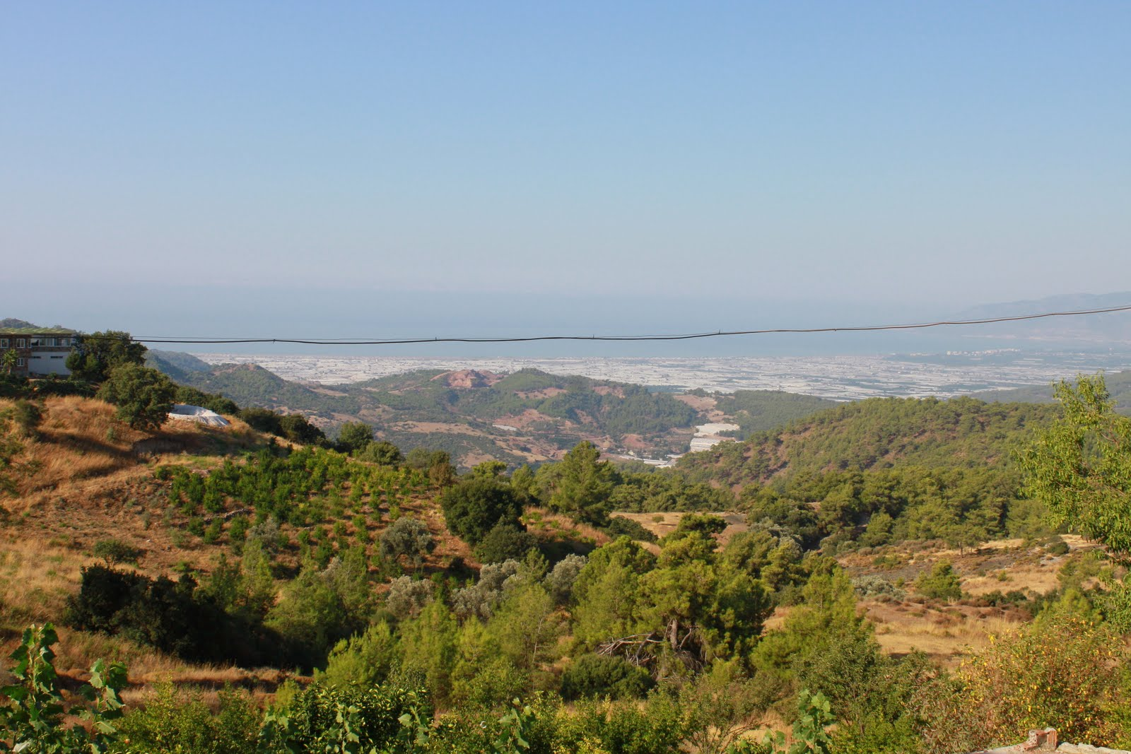 Demre, 07570 Demre/Antalya, Turkey